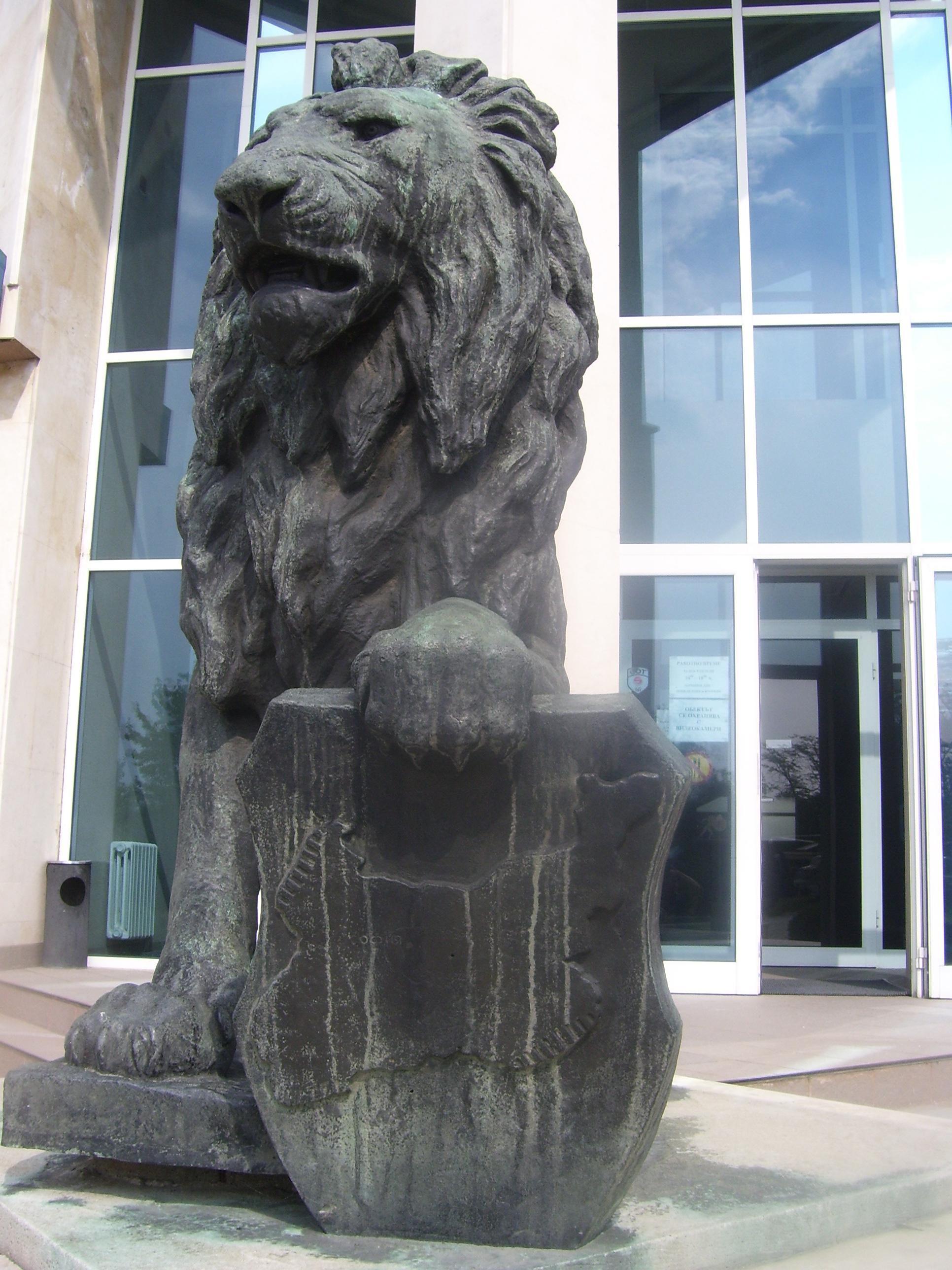 Карта на Велика България от статуя на входа на Военноисторическия музей, София, България.